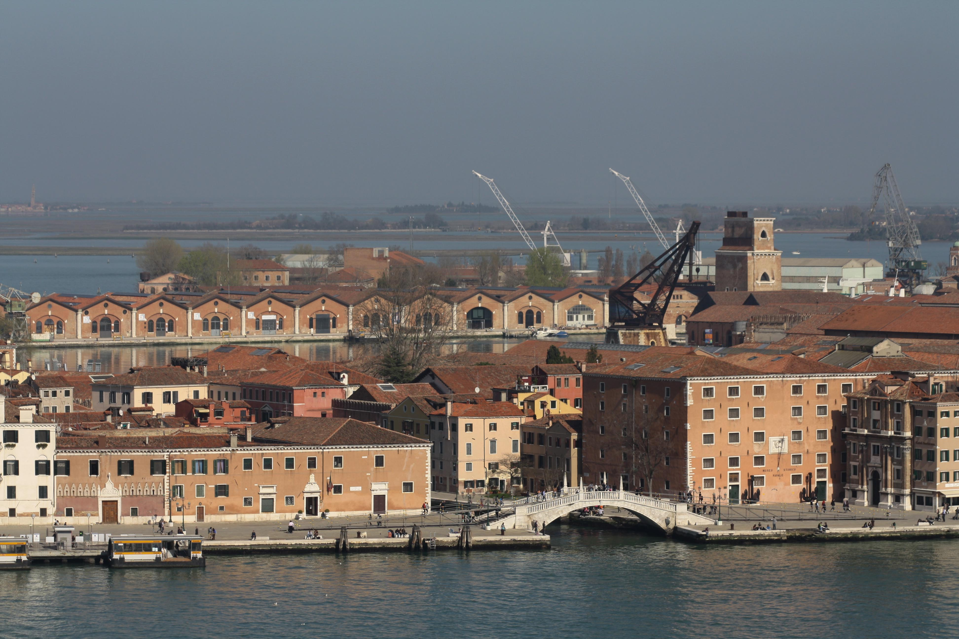 vista Arsenale di Venezia